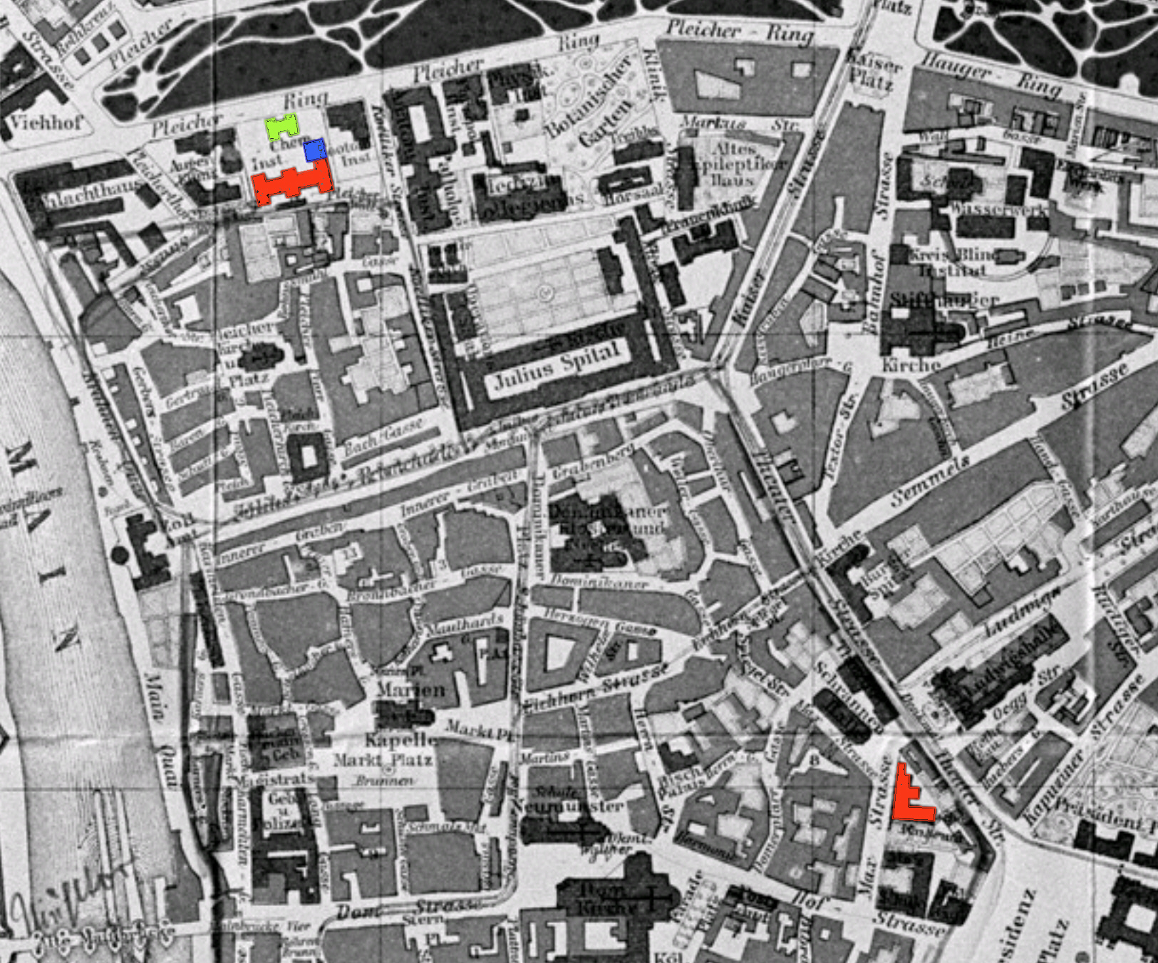 Innenstadtplan von Würzburg ca. 1900 mit relativ genauer Gebäudeskizzierung. Maxstr. 4: das ehemalige Chem. Institut mit allen An- und Umbauten Pleicher Ring 11: das neue Chem. Institut mit Hörsaalbau (blau) und Villa des Institutsvorstands (grün)